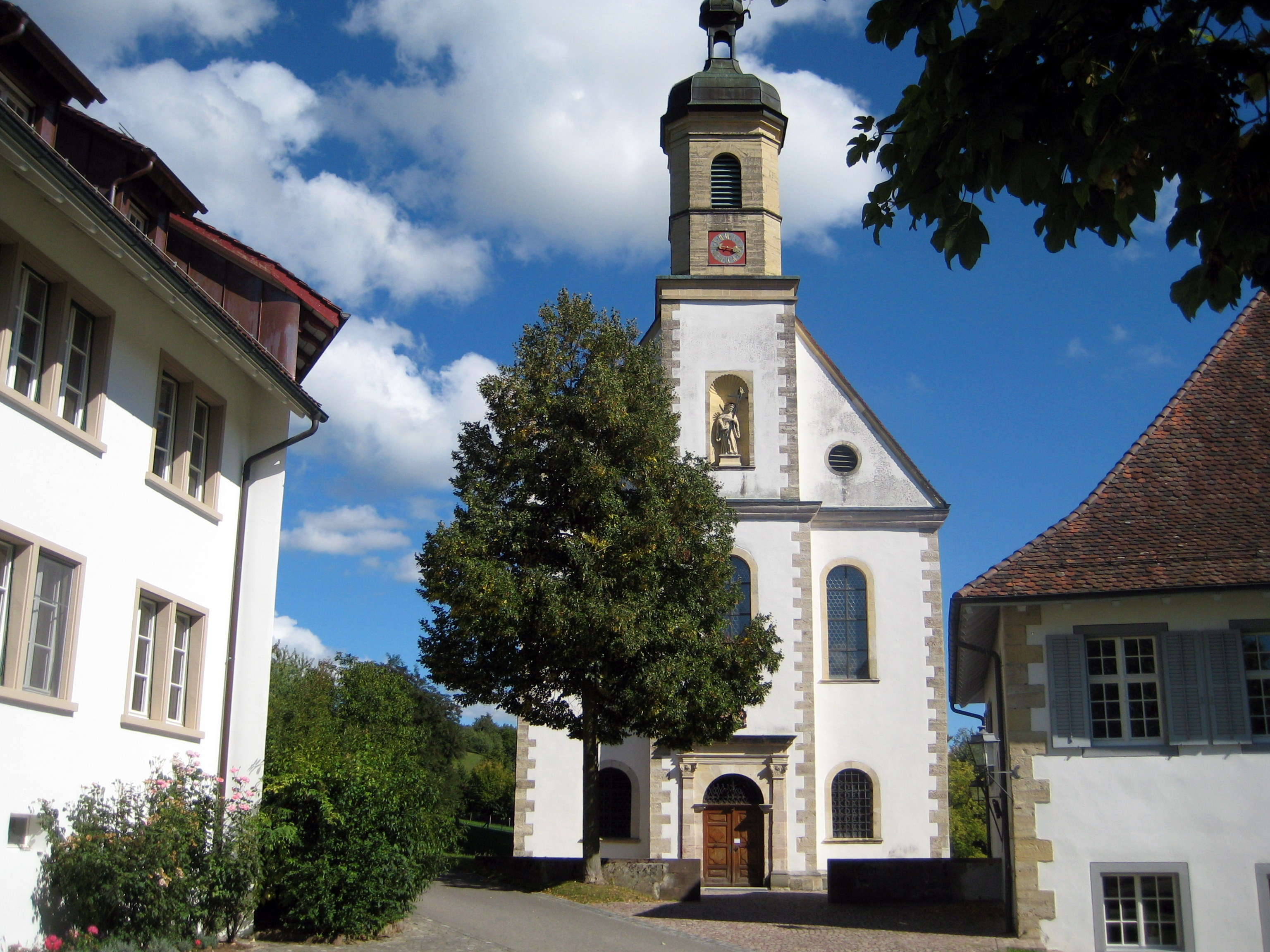 Kirche Olsberg AG